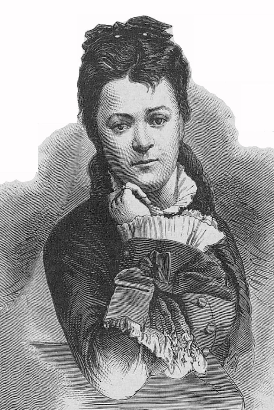 Кеммерер Александра Николаевна - русская балерина, 1876 год